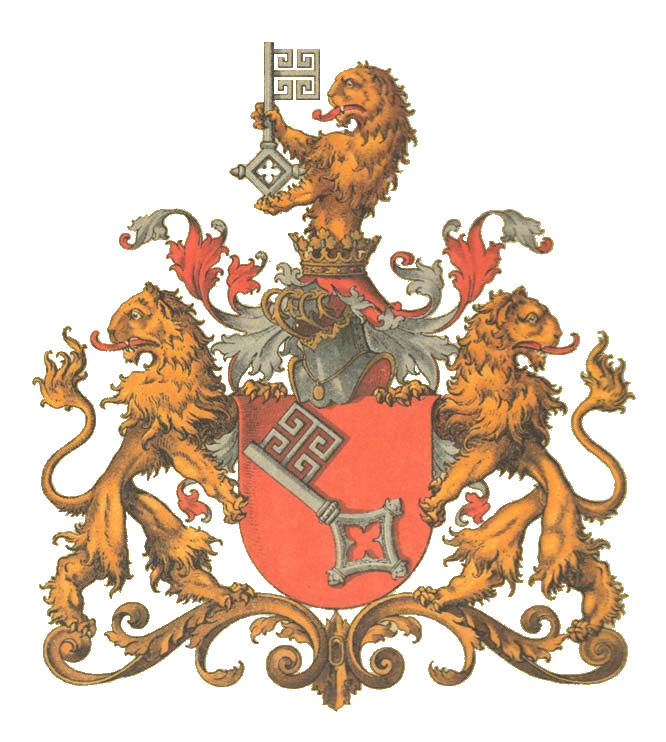 Brémy.